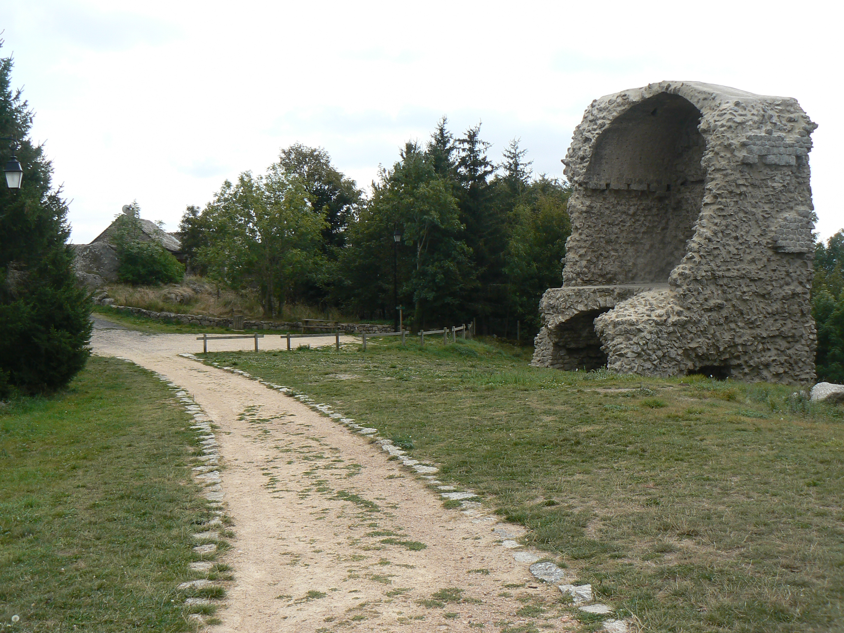 Ruines de la « Tour des Anglais » à Châteauneuf-de-Randon en Lozère